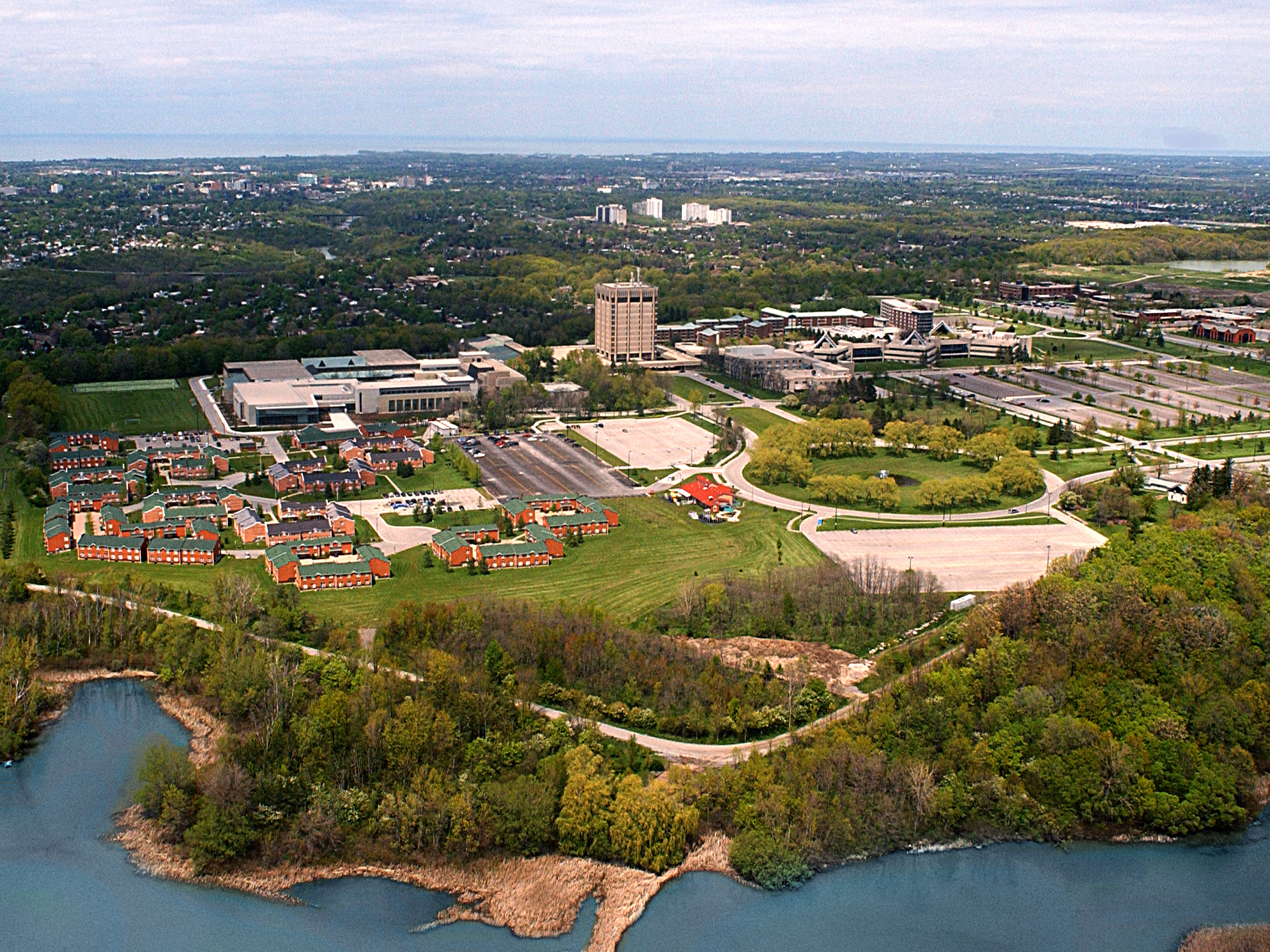 Bird's Eye View